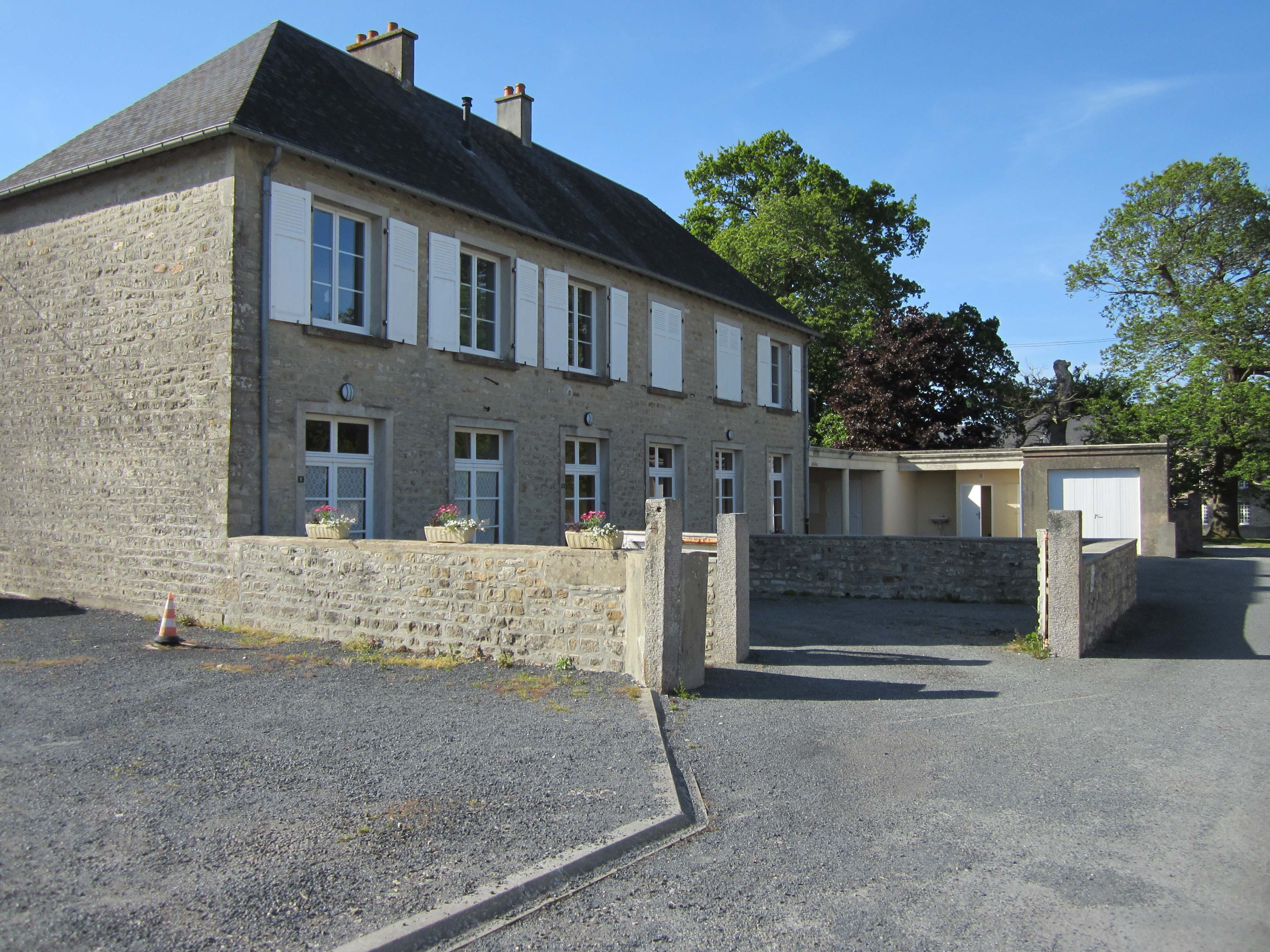 La Bonneville